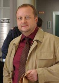 Cedo a Wikimedia Italia, la foto in questione facendo essa parte del Fanclub dell'attore, quello italiano di cui io sono fondatore, moderatore e creatore adesso vi invio l'autorizzazione scritta di mio pugno, attendo vostra conferma immediata per caricarlo su commons. distintissimi saluti--23:14, 29 ott 2008 (CET)